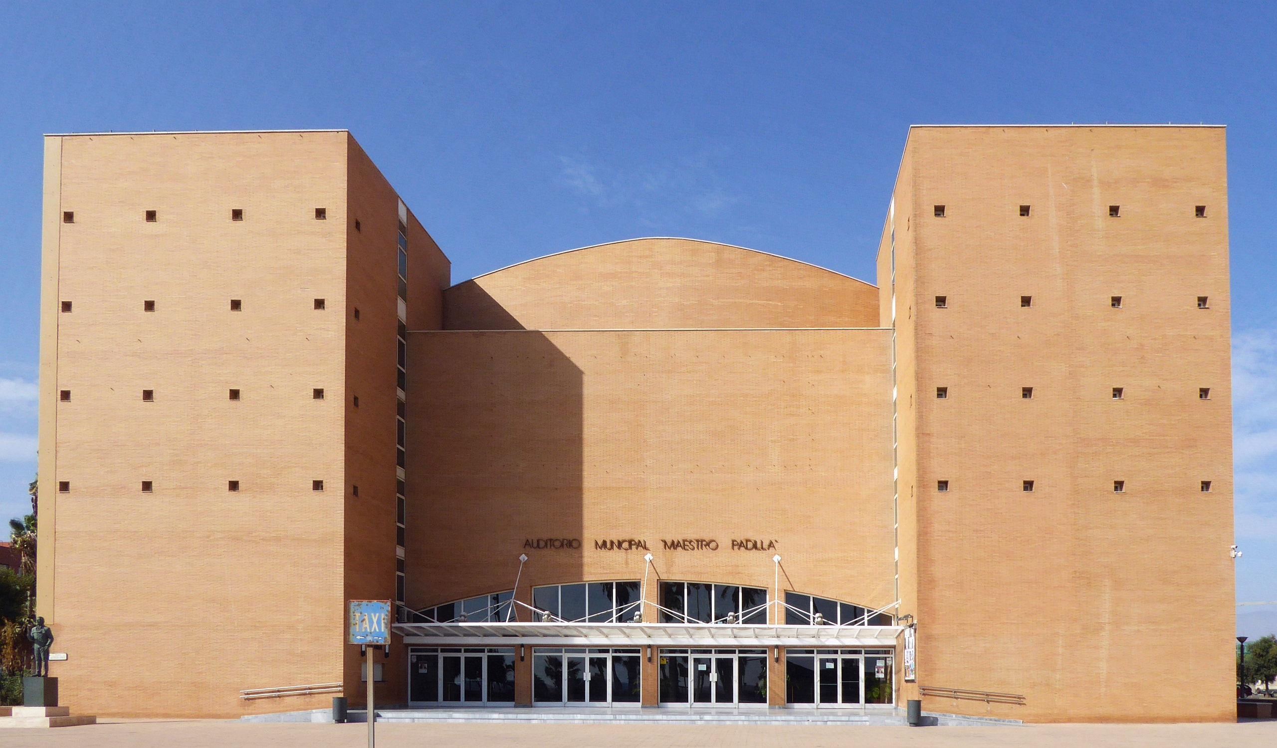 Auditorio Municipal "Maestro Padilla" in Almeria für Opern- Theater- Konzert- Kongress-Veranstaltungen. Erbaut bis 1992 in Andalusien Spanien - Foto Wolfgang Pehlemann P1110347